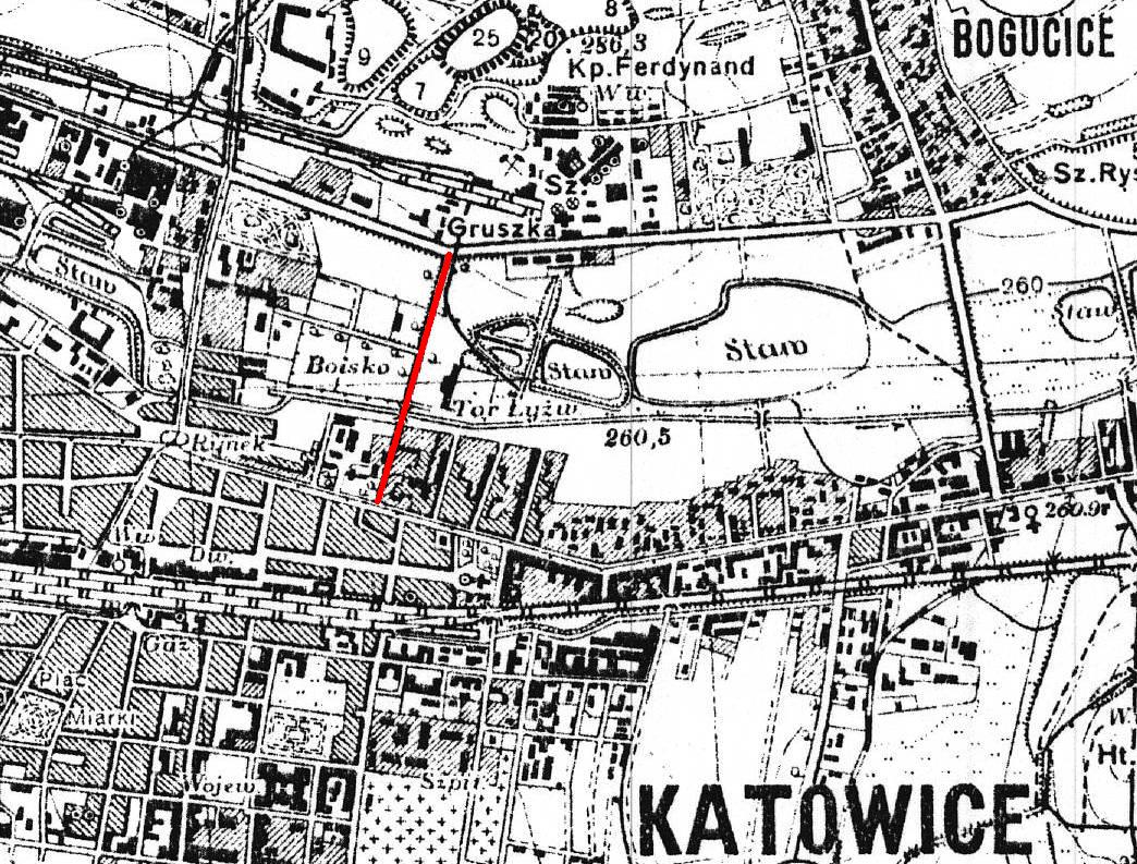 Mapa ulicy Bankowej w Katowicach (zaznaczona czerwoną linią) na fragmencie mapy Wojskowego Instytutu Geograficznego w Warszawie z roku 1933 (PAS 47 - SŁUP 28 - H)